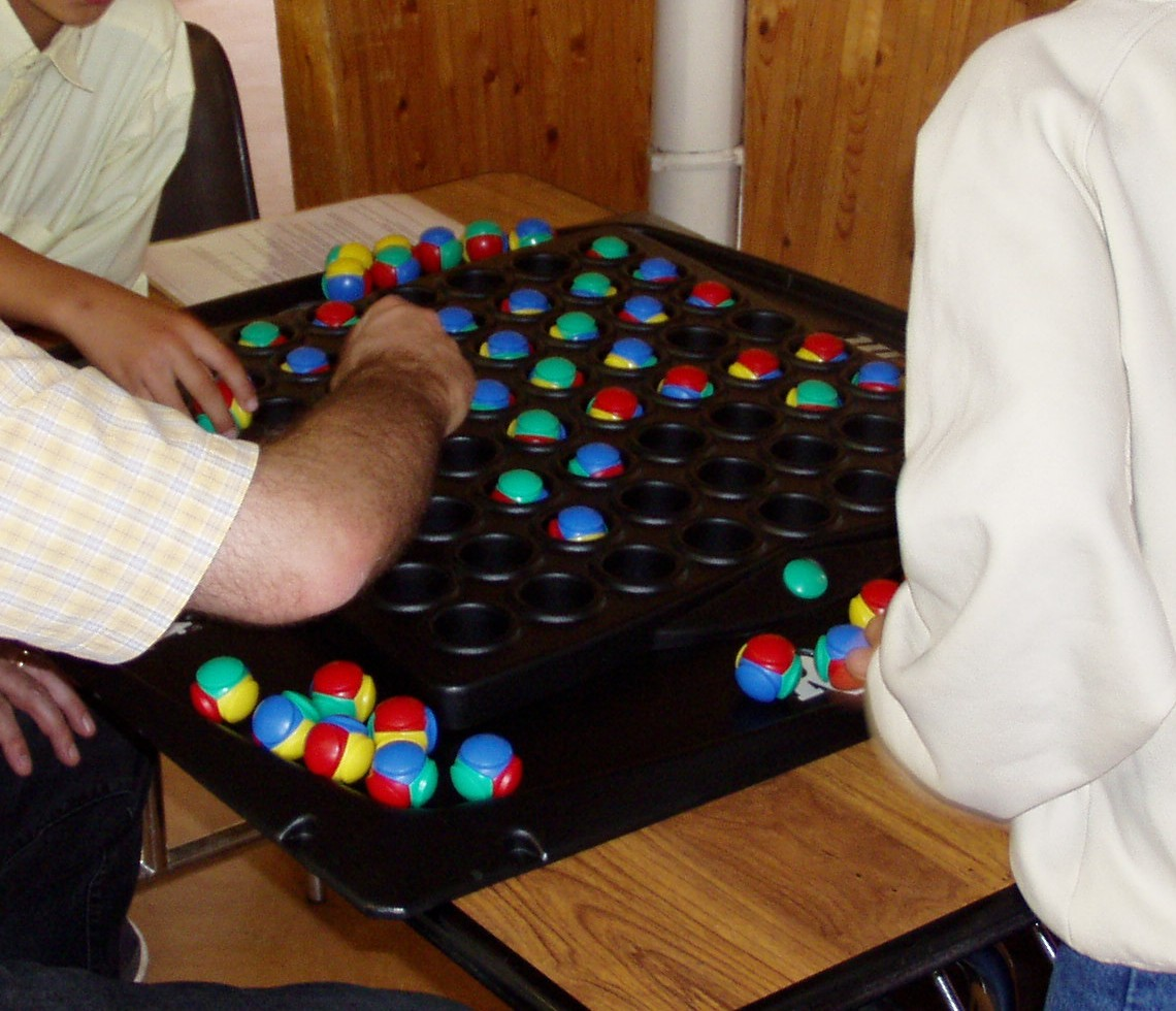 Une version géante de Rolit